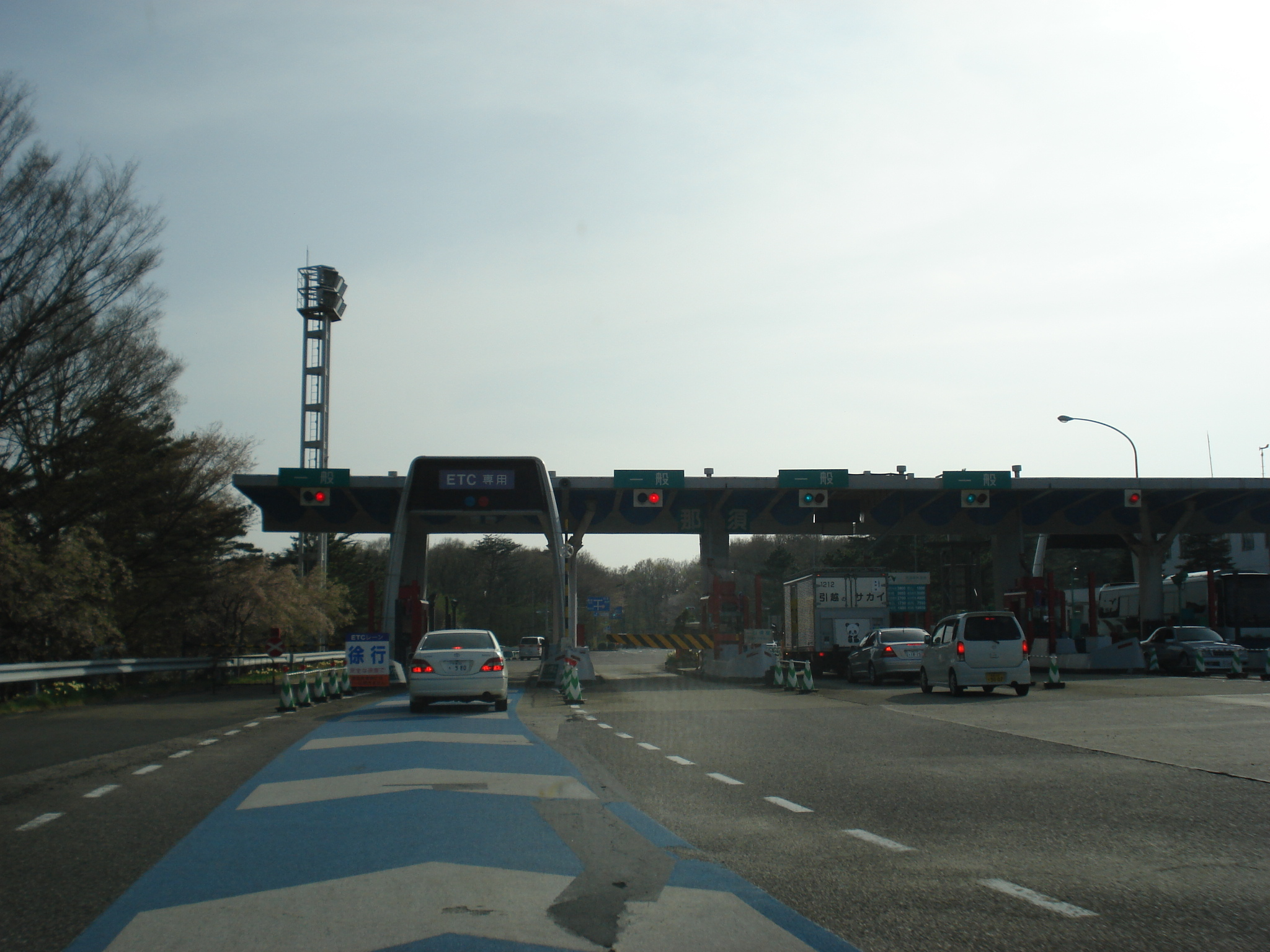 東北自動車道 那須インターチェンジ